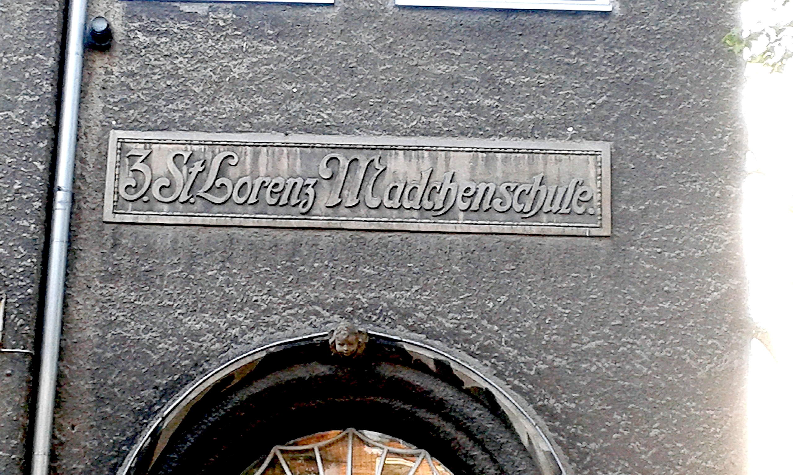 Lübeck / Historische Bezeichnung der Julius-Leber-Schule